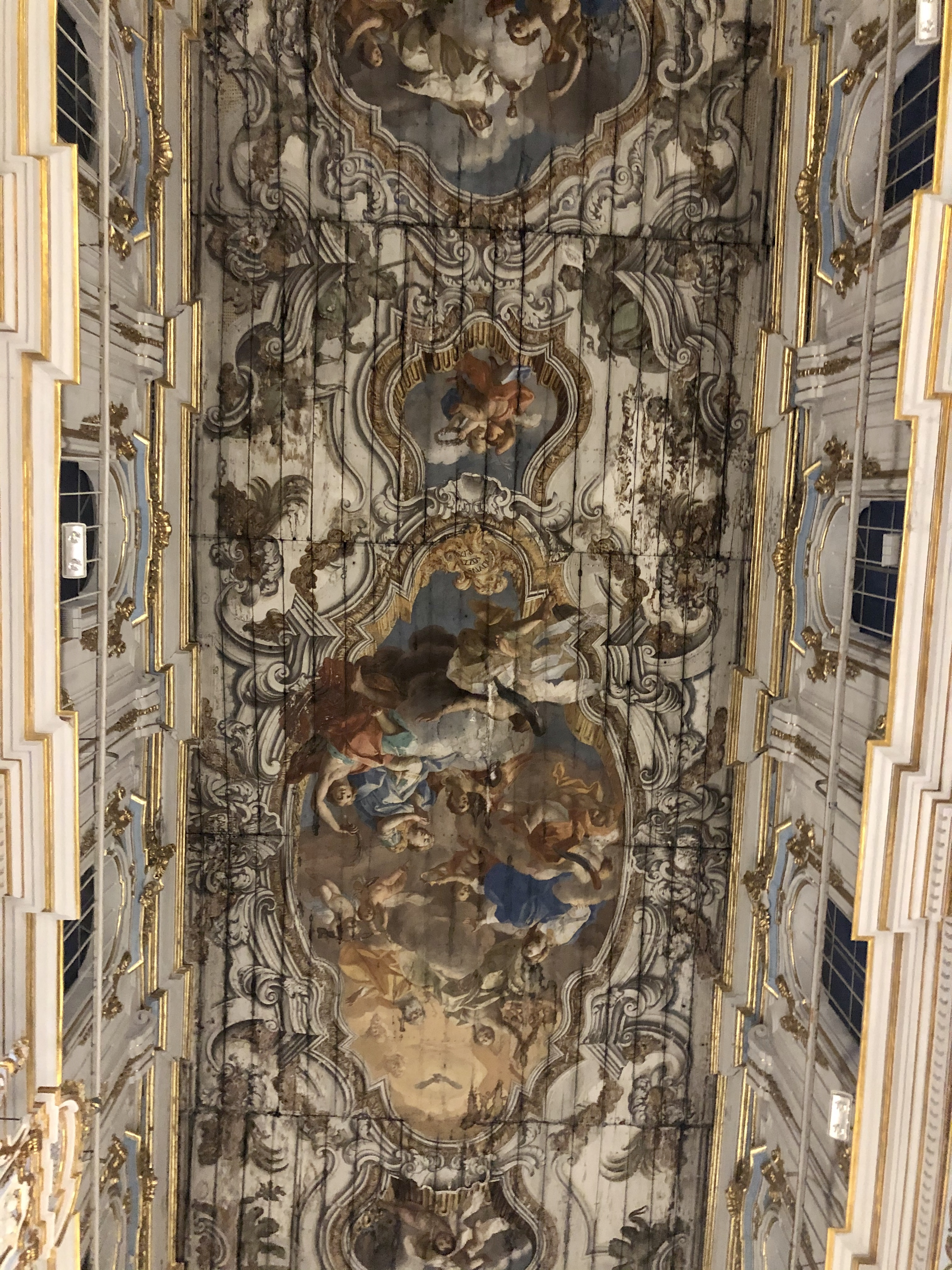 Interni basilica San Sebastiano, Melilli